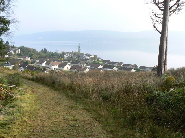 Ardentinny Village